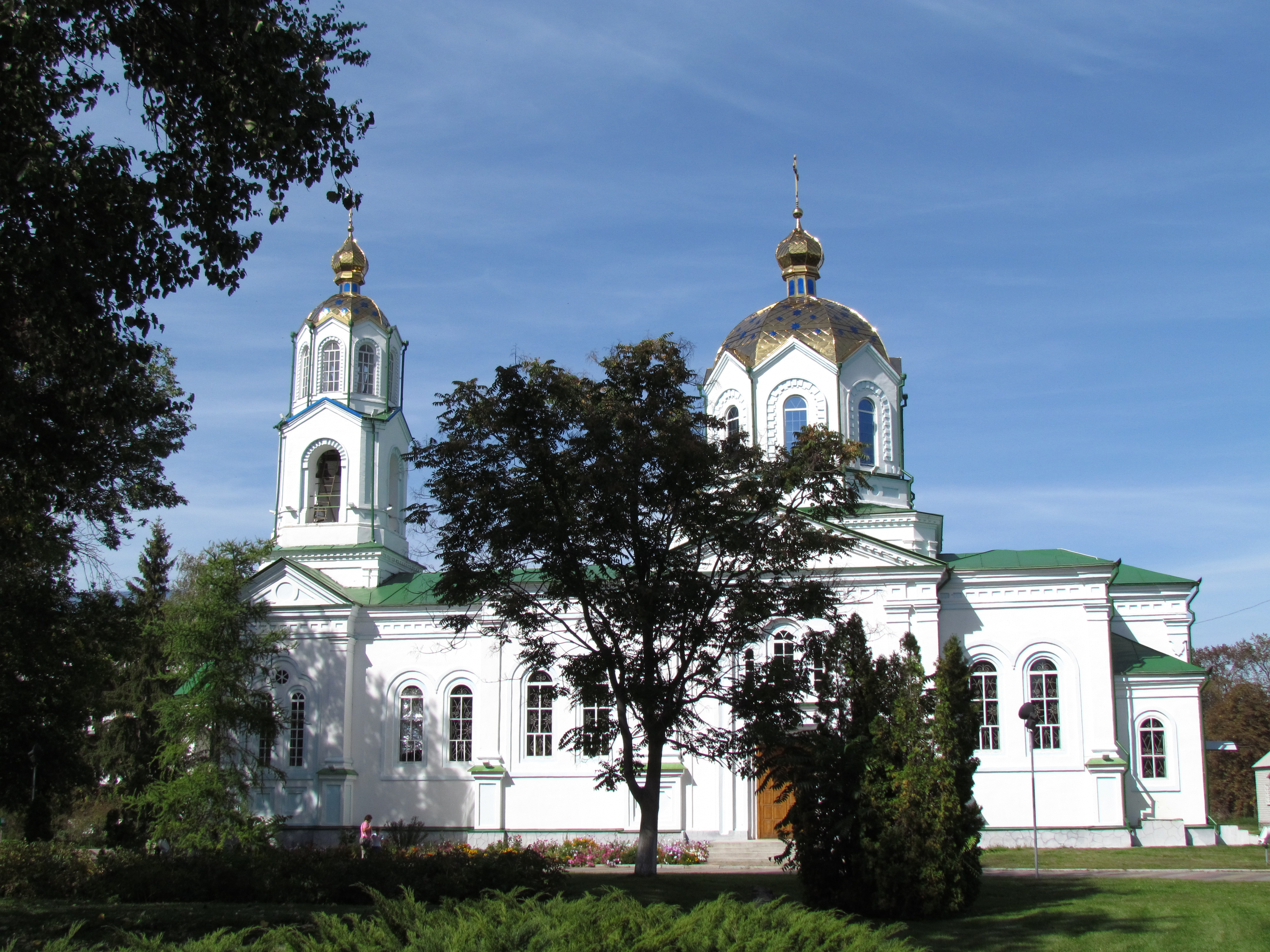 Миргород. Успенський собор